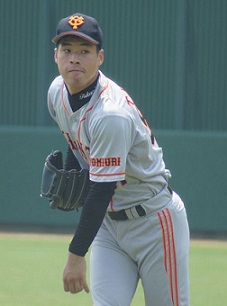 giants_takagikyo